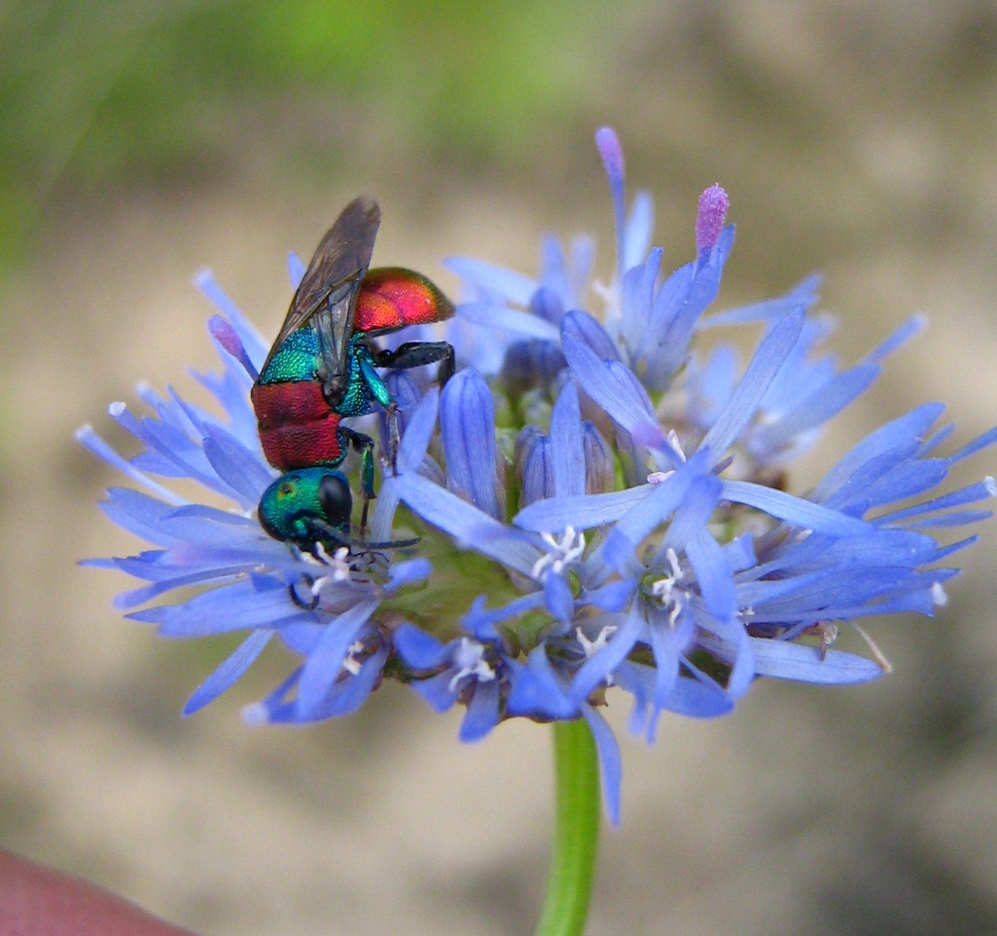 Оса-блискітка Hymenoptera: Chrysididae), що харчується на квітах букашника (Jasione sp.)